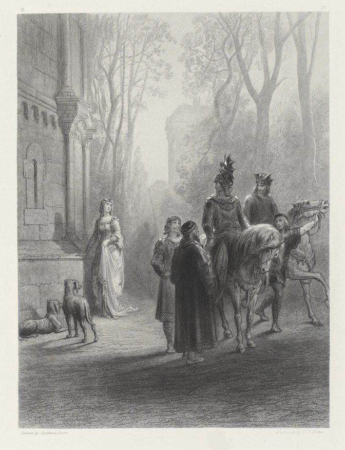 Il regarda, et plus étonné que si sept hommes se fussent attaqués à lui, il vit la jeune fille debout dans la clarté du matin.